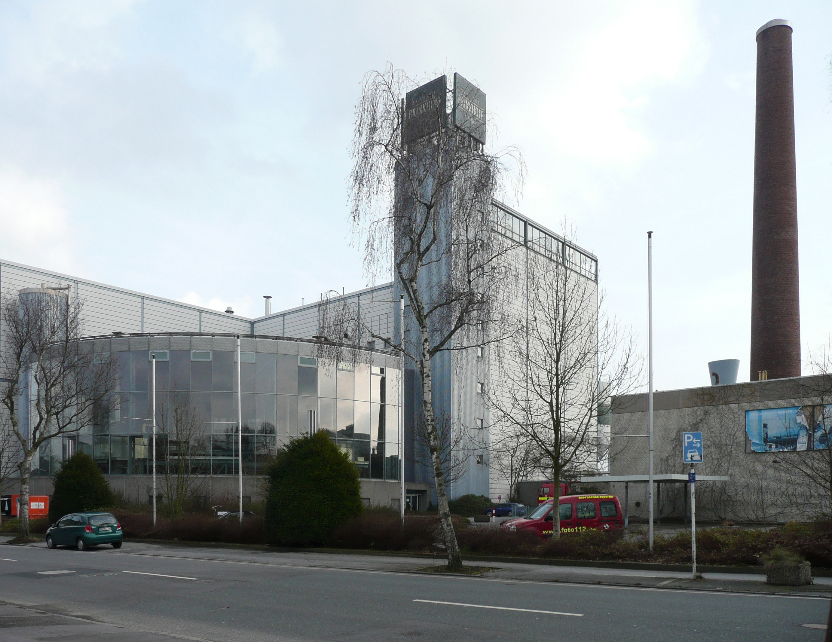 Letztes Betriebsgebäude der Dortmunder Ritter Brauerei